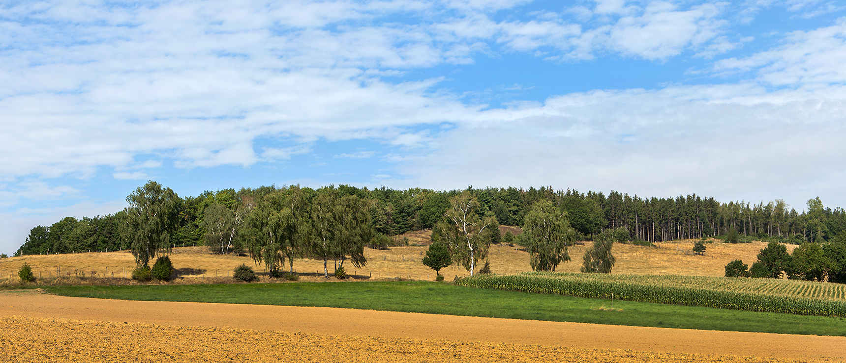 Die Ostseite des Naturschutzgebietes Eiberg in Vlotho, Kreis Herford, Nordrhein-Westfalen